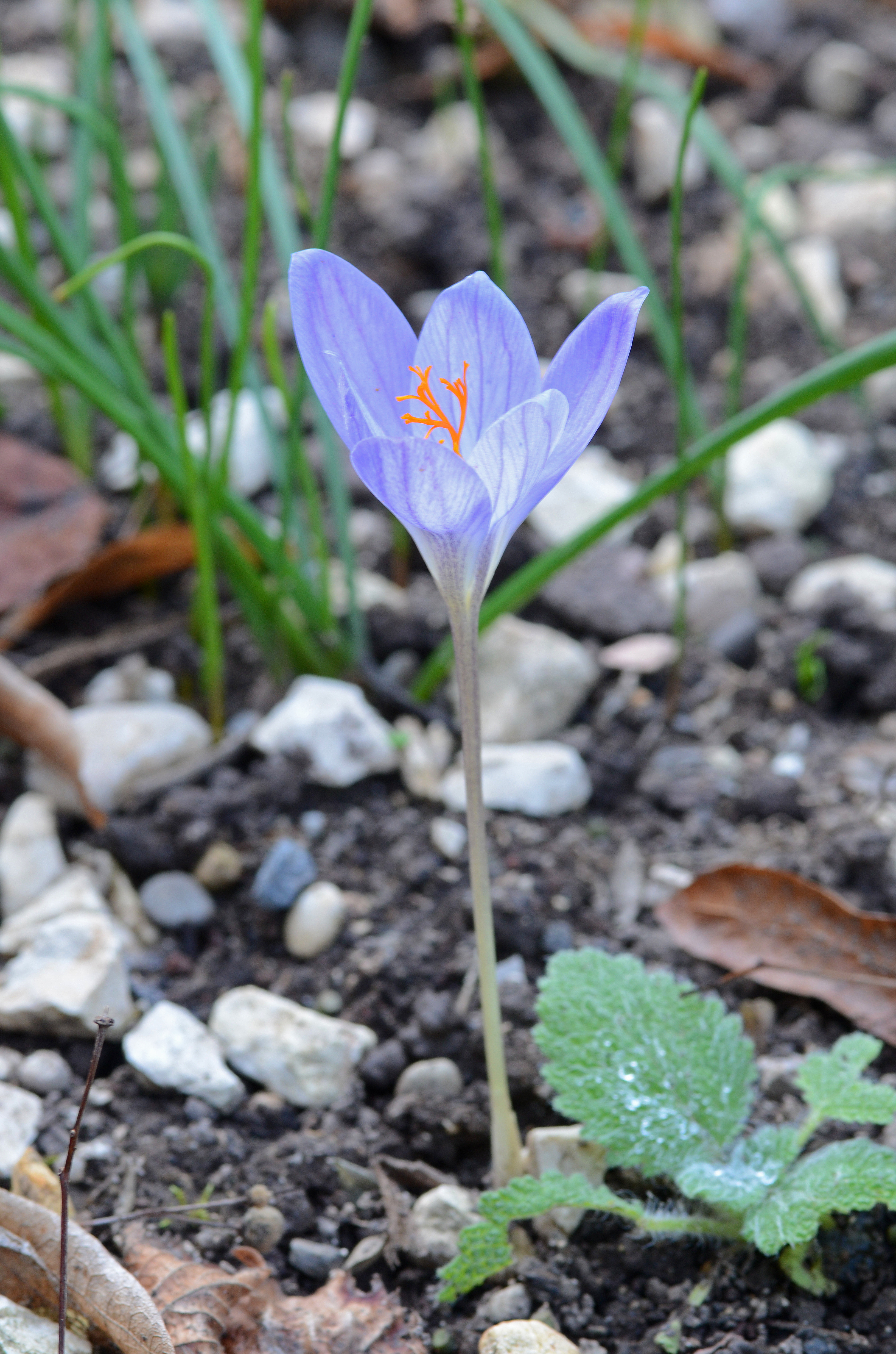 Crocus speciosus